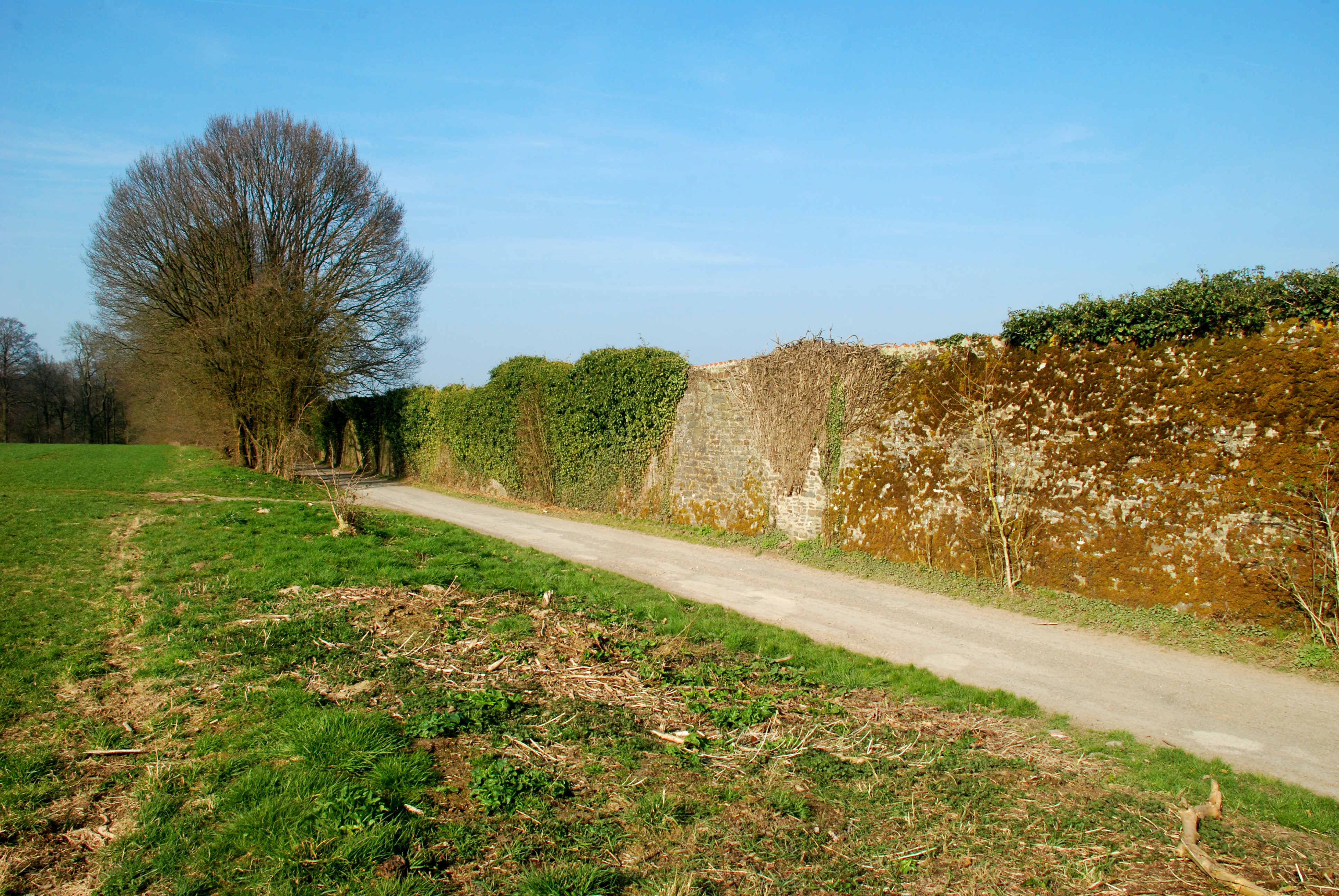 Belgique - Brabant wallon - Mur d'enceinte de l'abbaye de Villers-la-Ville